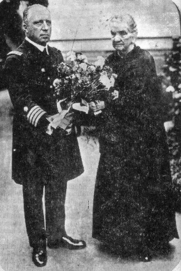 Doña Carmela Carvajal de Prat, en una de sus ultimas fotografías, recibiendo el homenaje del Comodoro Julio Víctor Goicochea Álvarez, jefe de la primera escuadra peruana que visito Chile después de la Guerra del Pacífico.